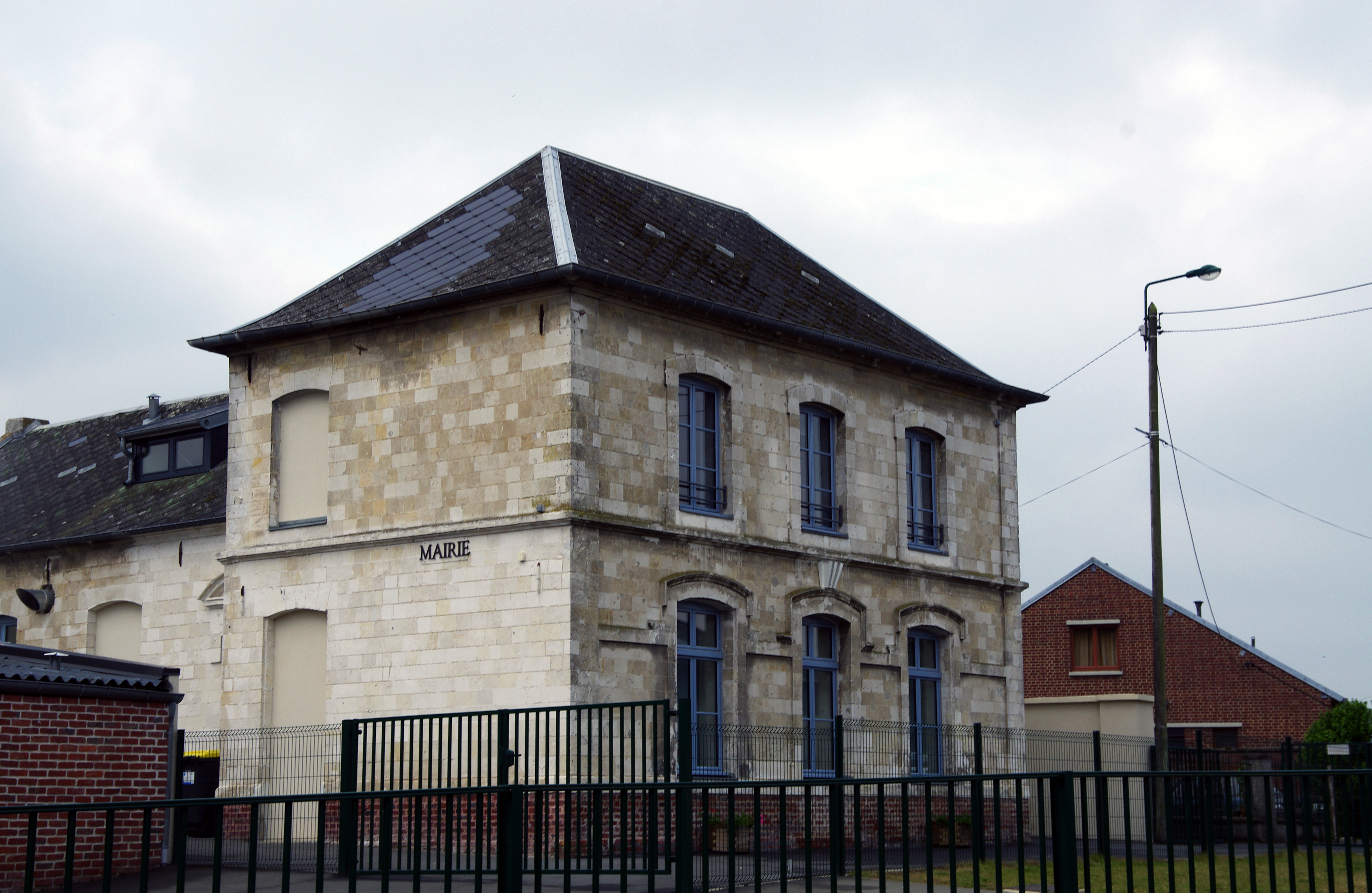 Bailleulmont (Pas-de-Calais, France) - La mairie. .